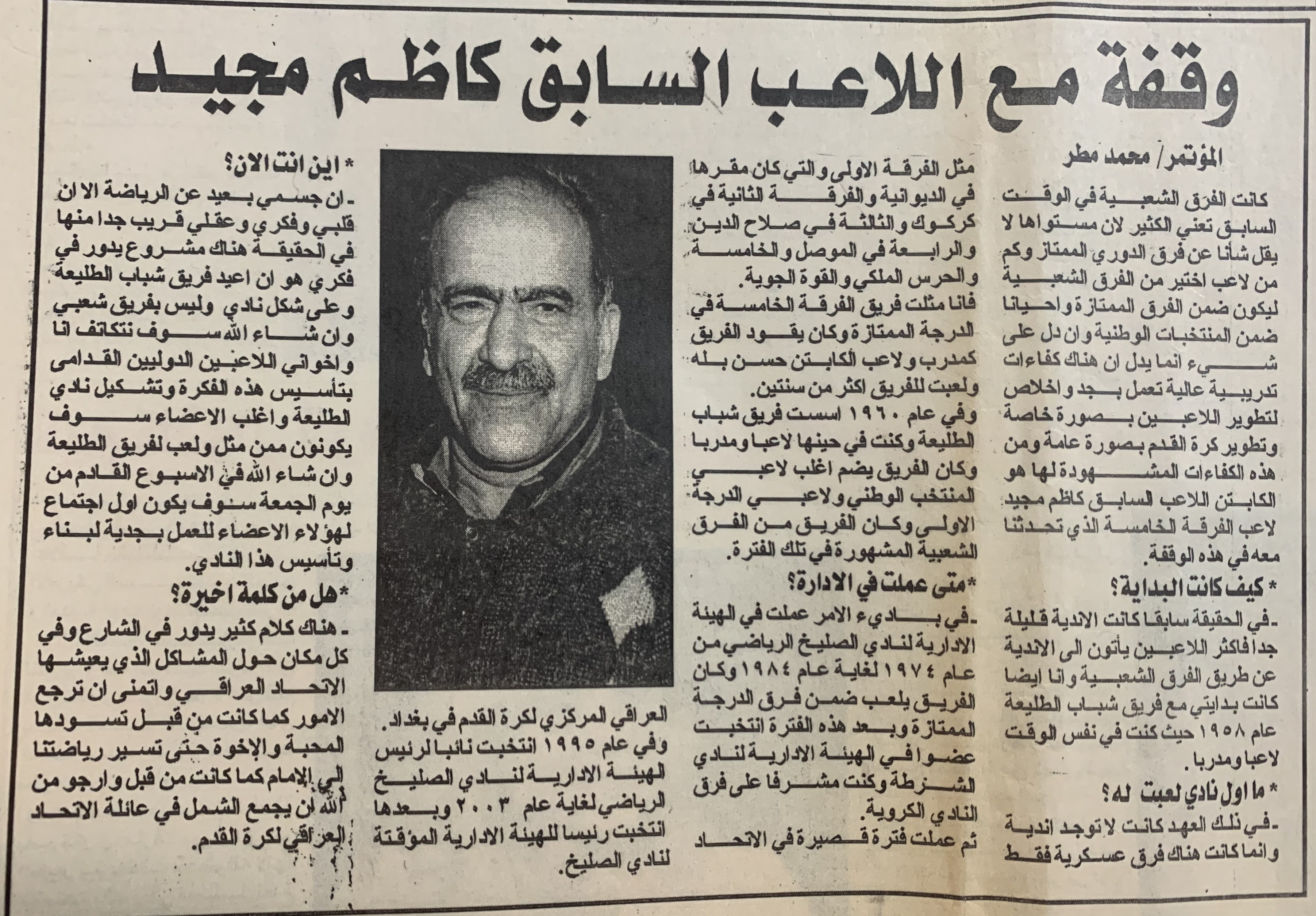 كاظم مجيد و هو يتحدث عن اعتزاله